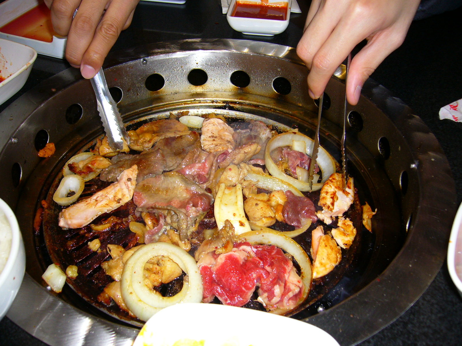 Korean barbecue